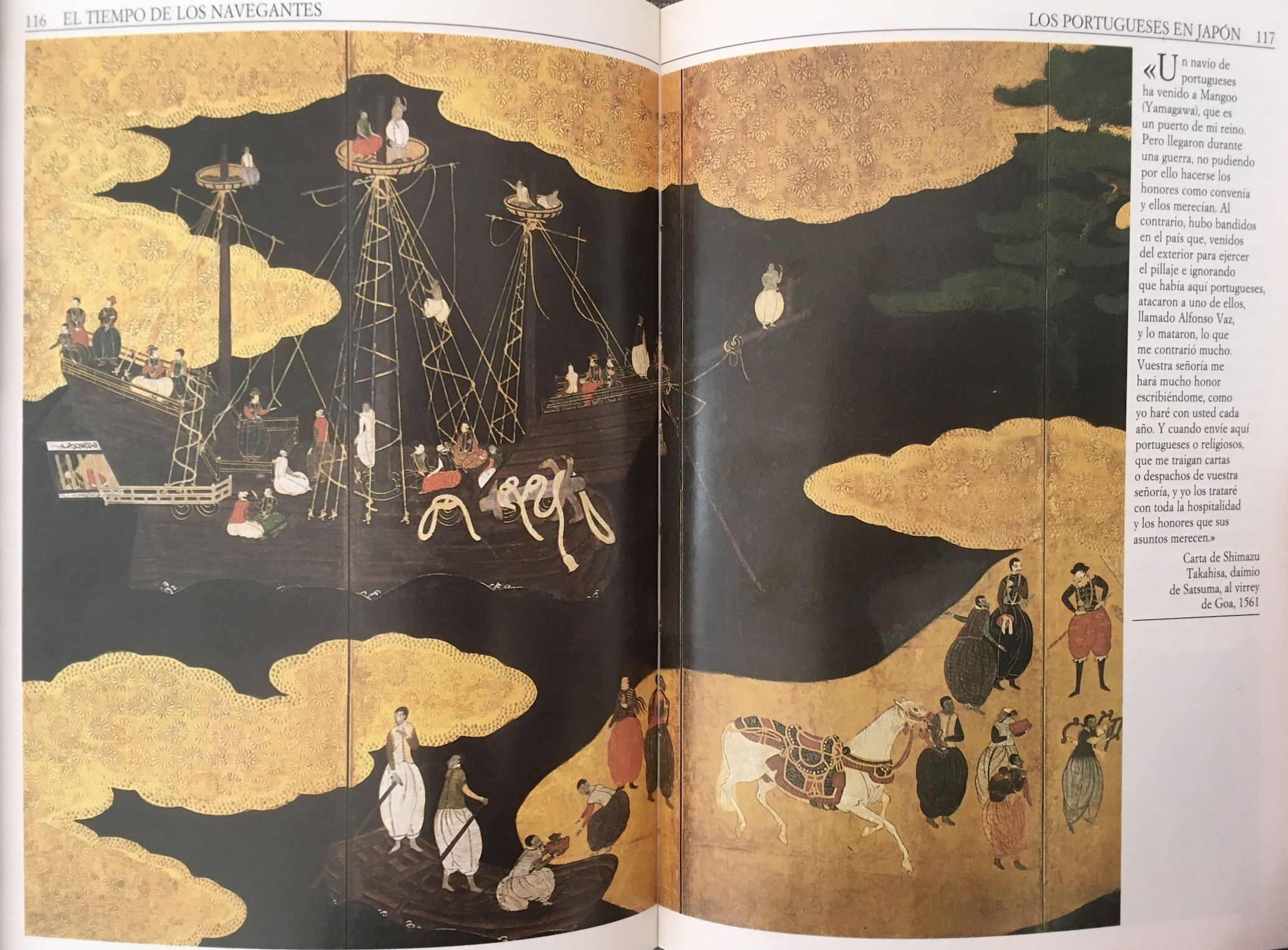 Los portugueses en Japón: Juncos a remos y a velas, estampa, colección del Museo de la Marina, París. — Doble página de imagen en el libro Marco Polo y la Ruta de la Seda de Jean-Pierre Drège, colección «Aguilar Universal / Historia» (nº 31), 1992. Descripción en la página 189.